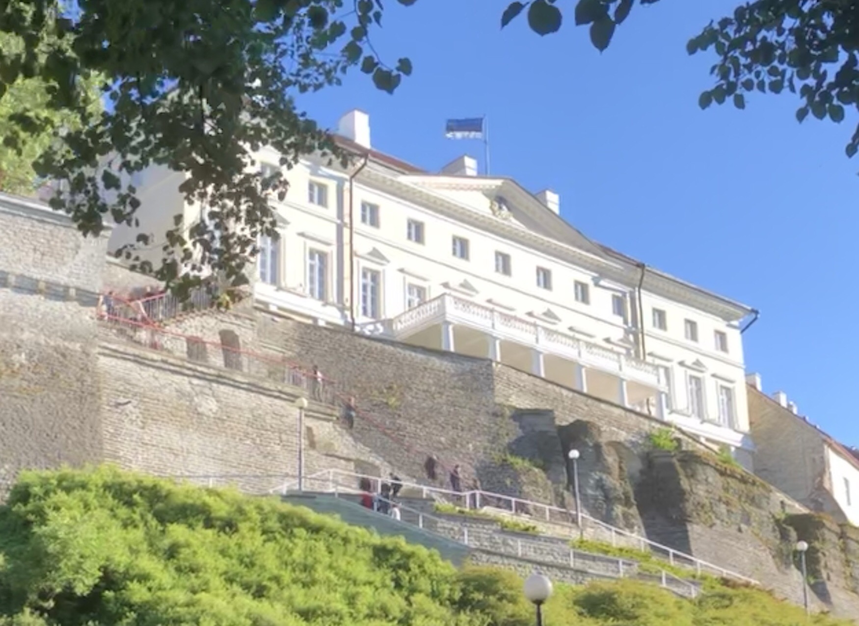 Stenbockhaus